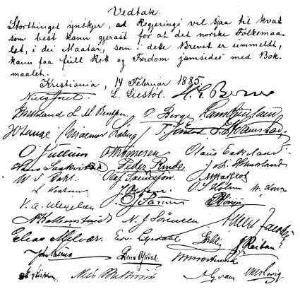 Jamstillingsvedtaket av 1885